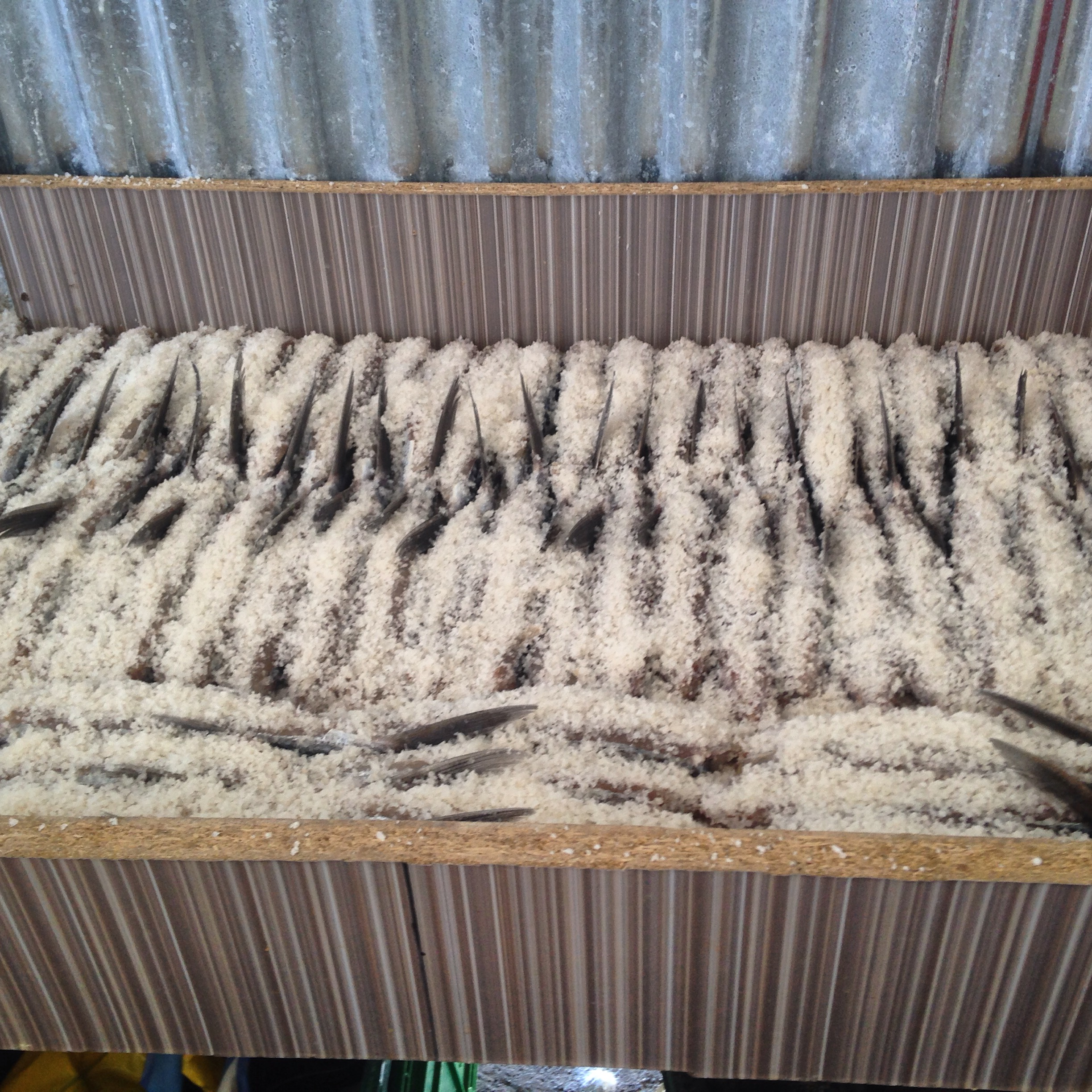 Volaores en sal en los secaderos de la playa del chorrillo en Ceuta.